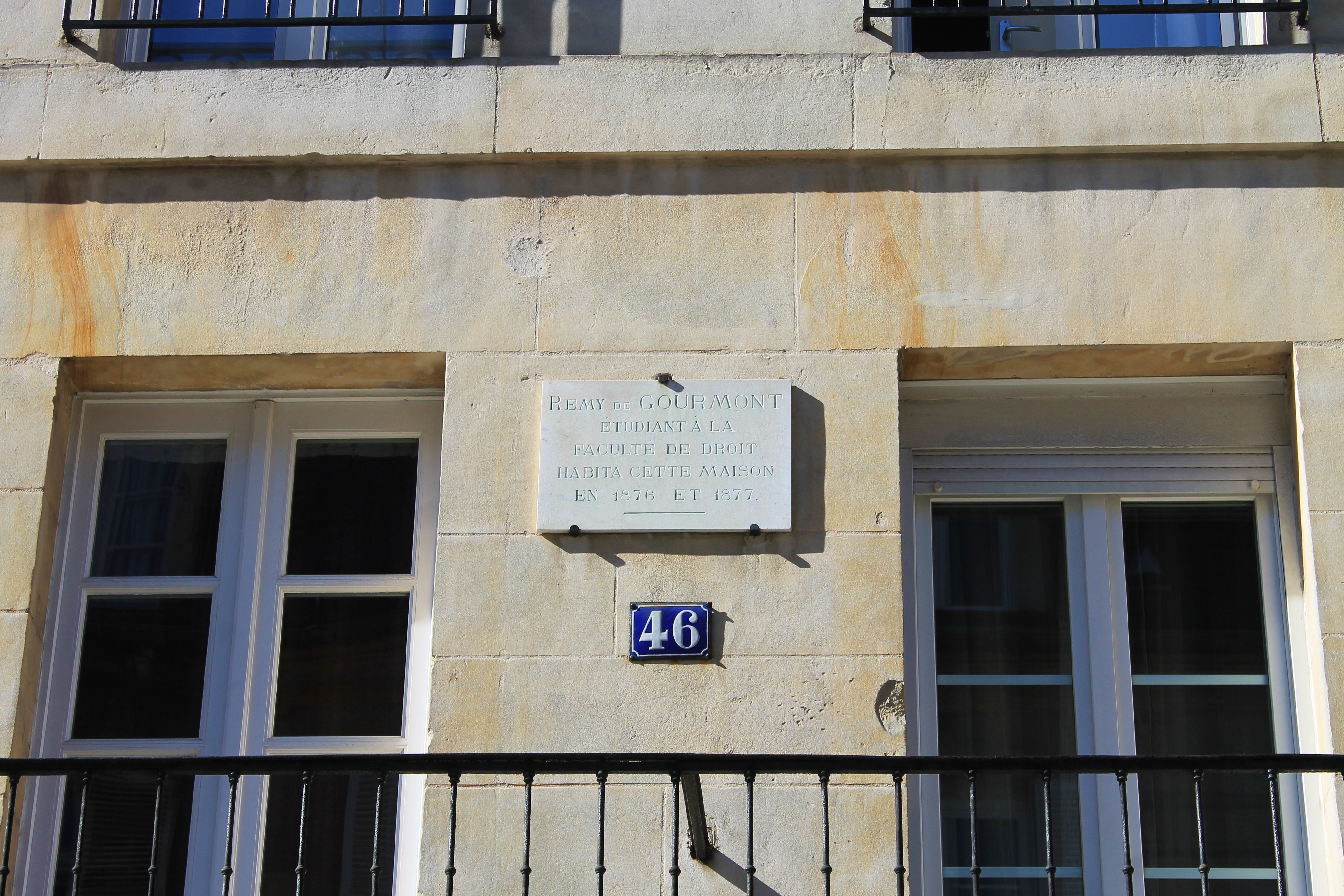 Maison où habita Remy de Gourmont de 1876 à 1877 au 46 rue Écuyère à Caen (Calvados)